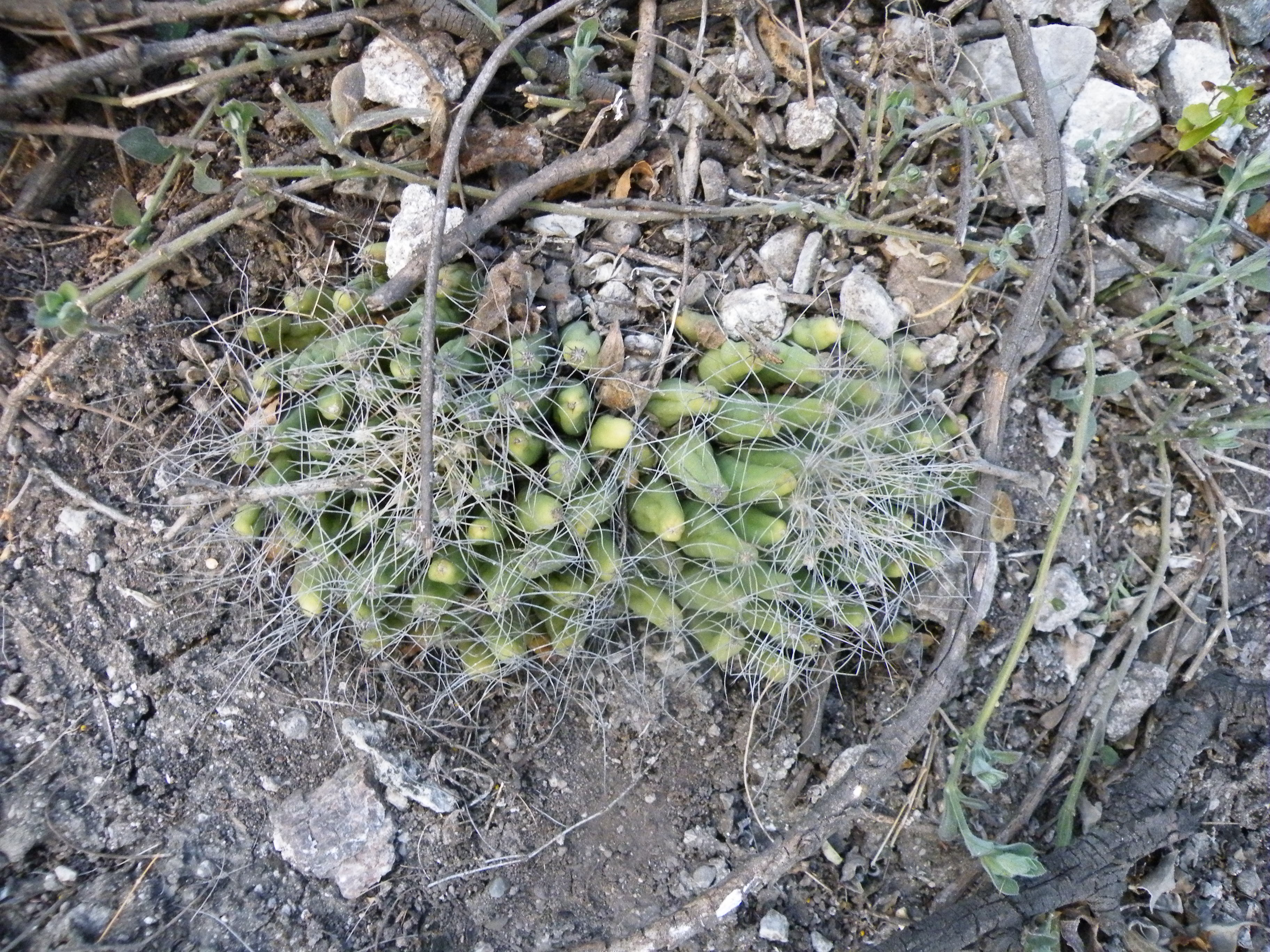 Gilo, Hidalgo